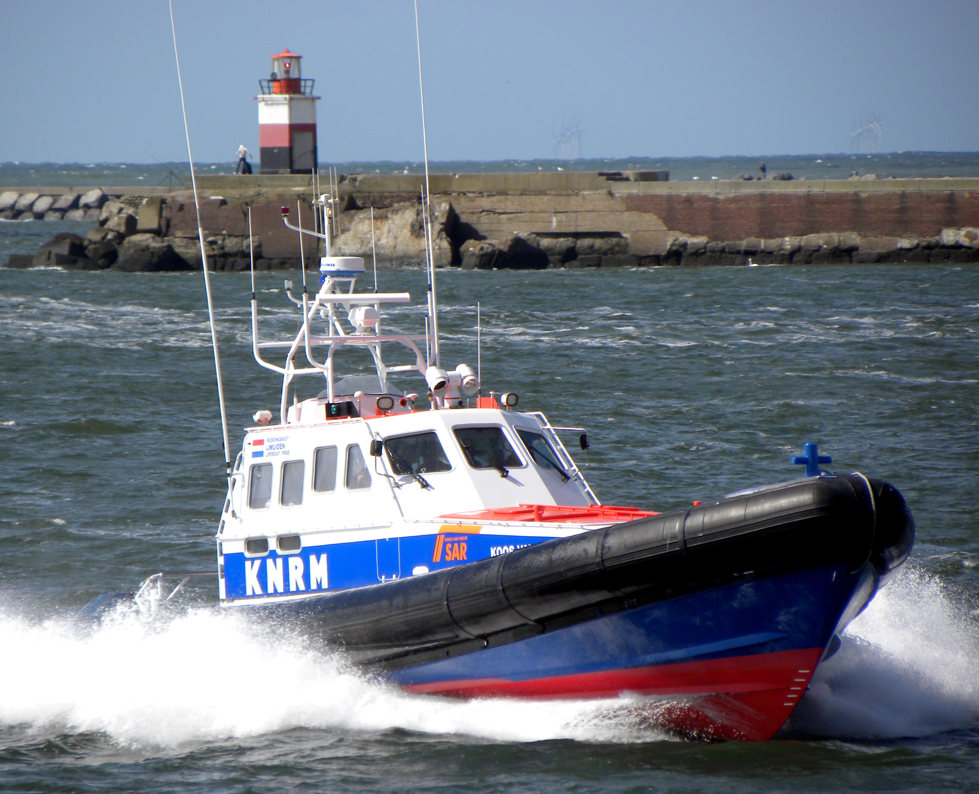 Koos van Messel KNRM lifeboat seen at IJmuiden build 2003